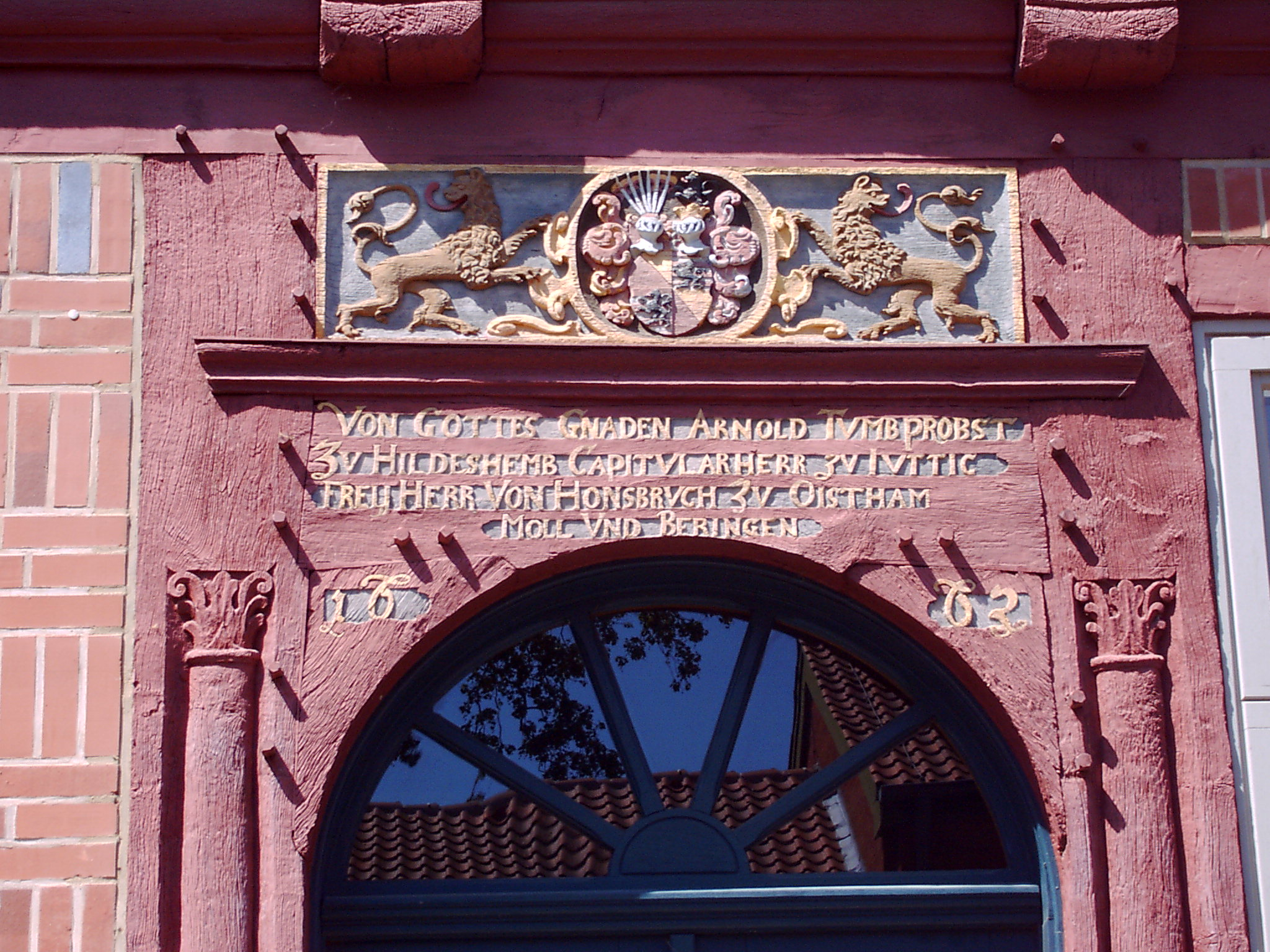 Inschrift und Wappen über dem Eingang zur Großvogtei in Hildesheim